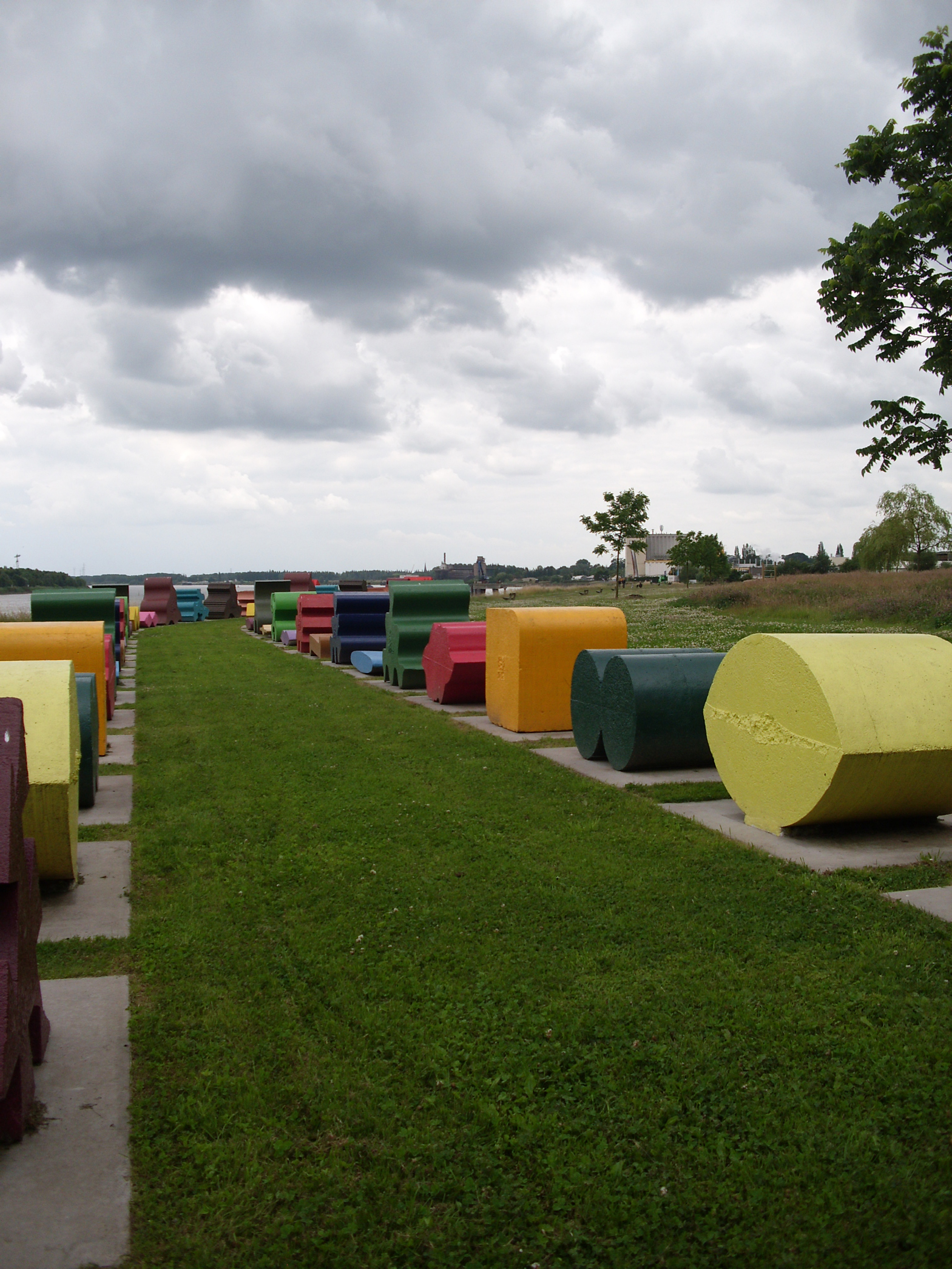 Lettertuin van de kunstenaar Guy Rombouts - einde van de Kerkstraat - nabij Schelde - Burcht - Zwijndrecht - provincie Antwerpen - Vlaanderen - België